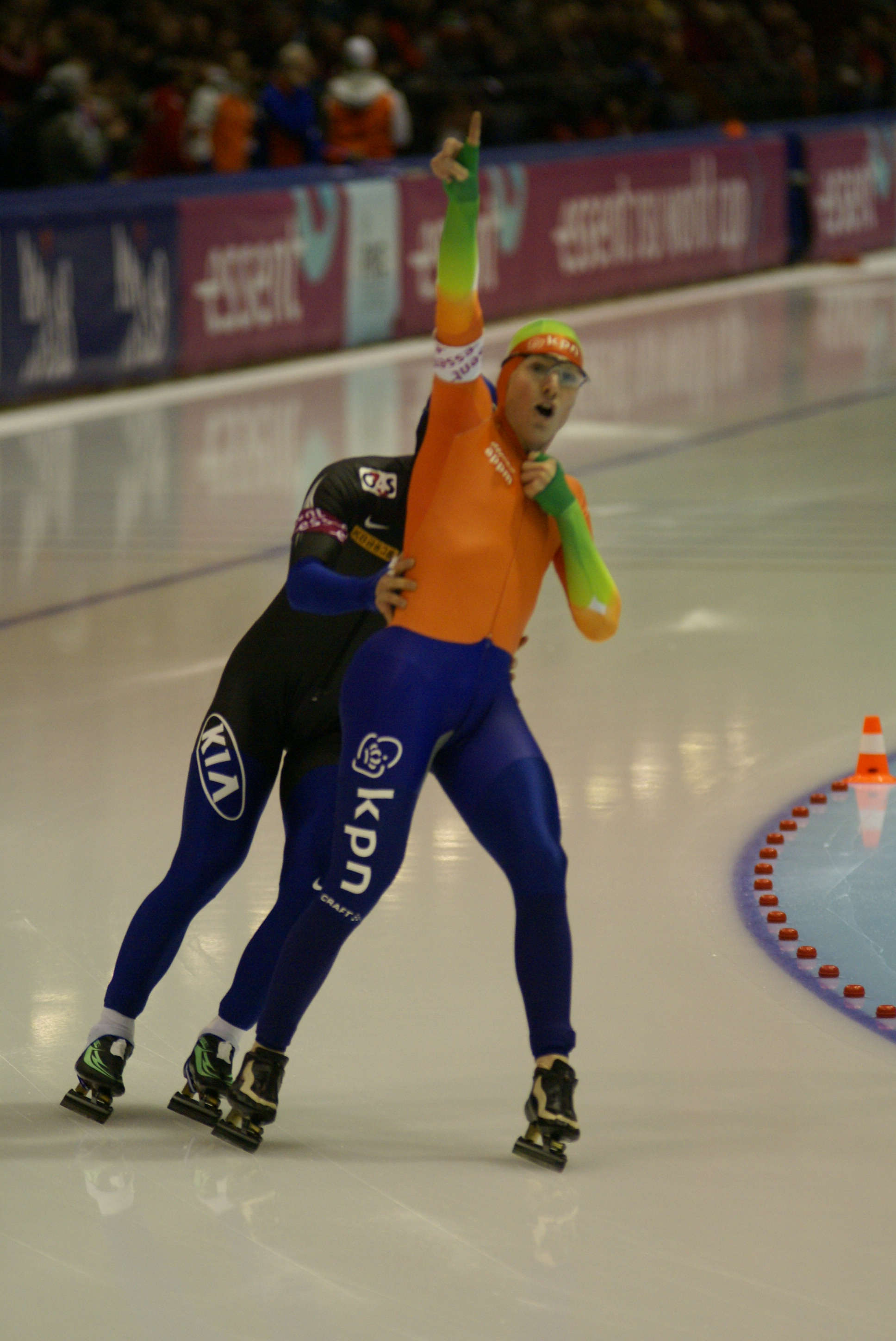 Sjoerd de Vries net over de finish van de 1000 meter op de Essent World Cup Thialf.